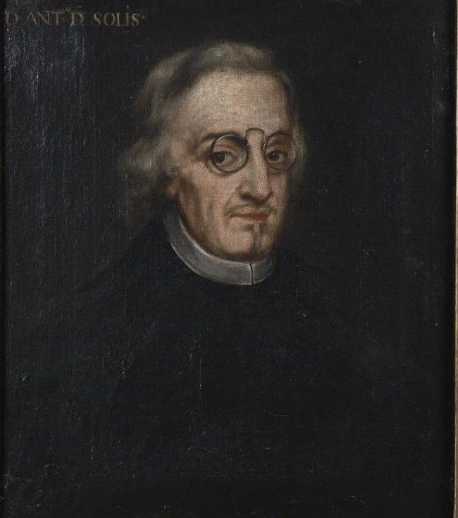 Retrato del escritor español Antonio de Solís y Rivadeneyra (1610-1686).